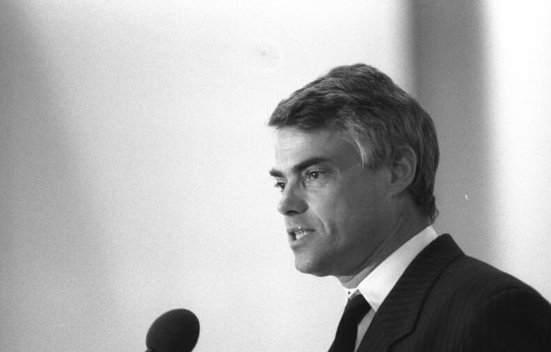 ADN/Gahlbeck/30.6.90/Leipzig: DSU-Bundesparteitag Prof. Hansjoachim Walther ist neuer Vorsitzender der DSU. Der 50jährige ist seit 27 Jahren verheiratet und hat zwei Söhne. An der Technischen Hochschule Ilmenau hat er eine ordentliche Professur für Mathematik.